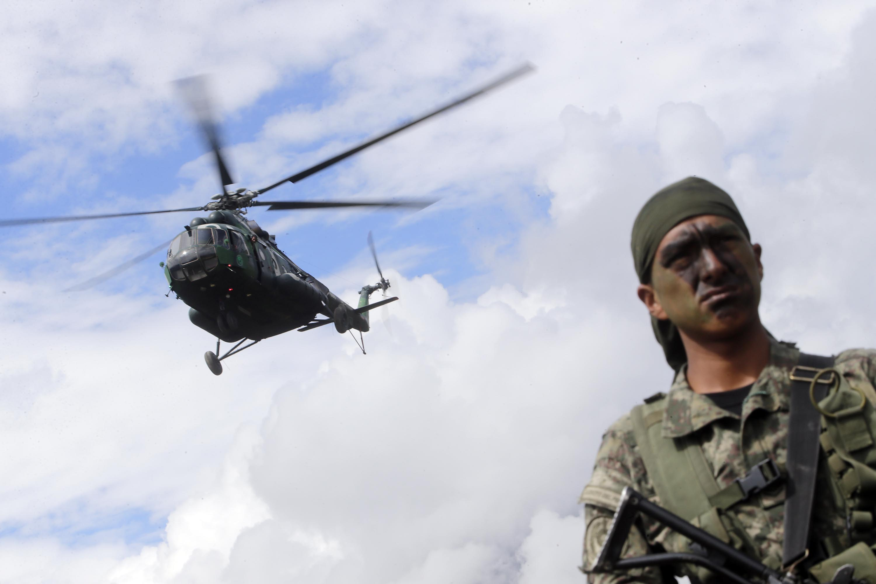 El ministro de Defensa, Pedro Cateriano Bellido, cumplió una visita de inspección a las bases contraterroristas ubicadas en el Valle de los Ríos Apurímac, Ene y Mantaro (VRAEM) donde comprobó las condiciones óptimas en que se desempeñan nuestros soldados. Acompañado del comandante general del Ejército, General Ronald Hurtado Jiménez, el titular del sector arribó a las bases de Mazamari, Pichari e Incahuasi, en las regiones Junín y Cusco. En Incahuasi, el ministro verificó las nuevas instalaciones y el correcto desempeño del personal asignado en esta base militar, desde donde se logrará control territorial en la zona. También se supervisaron las operaciones militares que se realizan en Mazángaro y Unión Mantaro, puntos claves en el VRAEM y rutas de tránsito del narcotráfico. El ministro Cateriano anunció que el gobierno reforzará la estrategia contraterrorista con importantes adquisiciones. “A fines de este año llegarán ocho nuevos helicópteros para servir en esta zona. Se trata de una geografía agreste donde el principal vehículo de transporte es el helicóptero, y las Fuerzas Armadas lo requieren”, mencionó. Finalmente, adelantó que el gobierno construirá cuatro nuevas bases contraterroristas y la Fuerza Aérea adquirirá seis radares, destinados a reforzar la lucha contra el terrorismo, narcotráfico y otras amenazas.